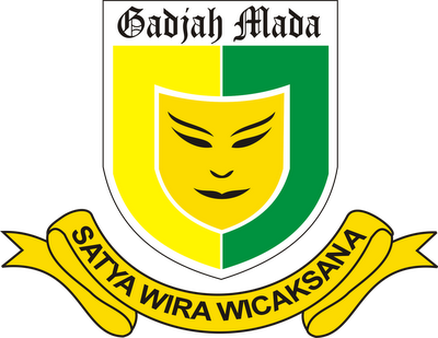 Merupakan satuan Khusus Polisi Militer Angkatan Darat yang berada di bawah kendali Panglima Divisi Infantri 2/Kostrad.